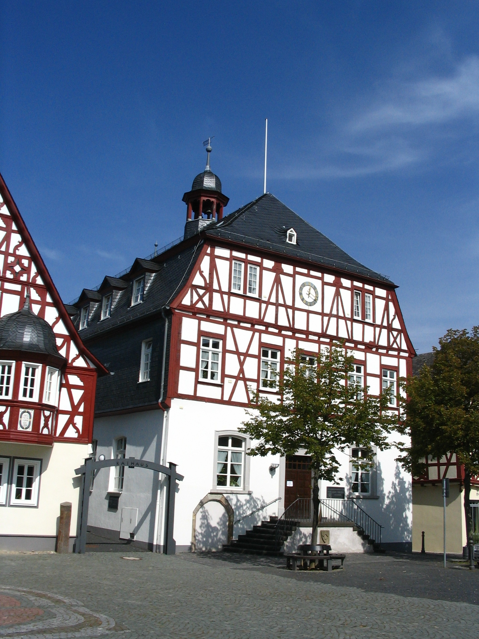 Rathaus Kirchberg (Hunsrück)